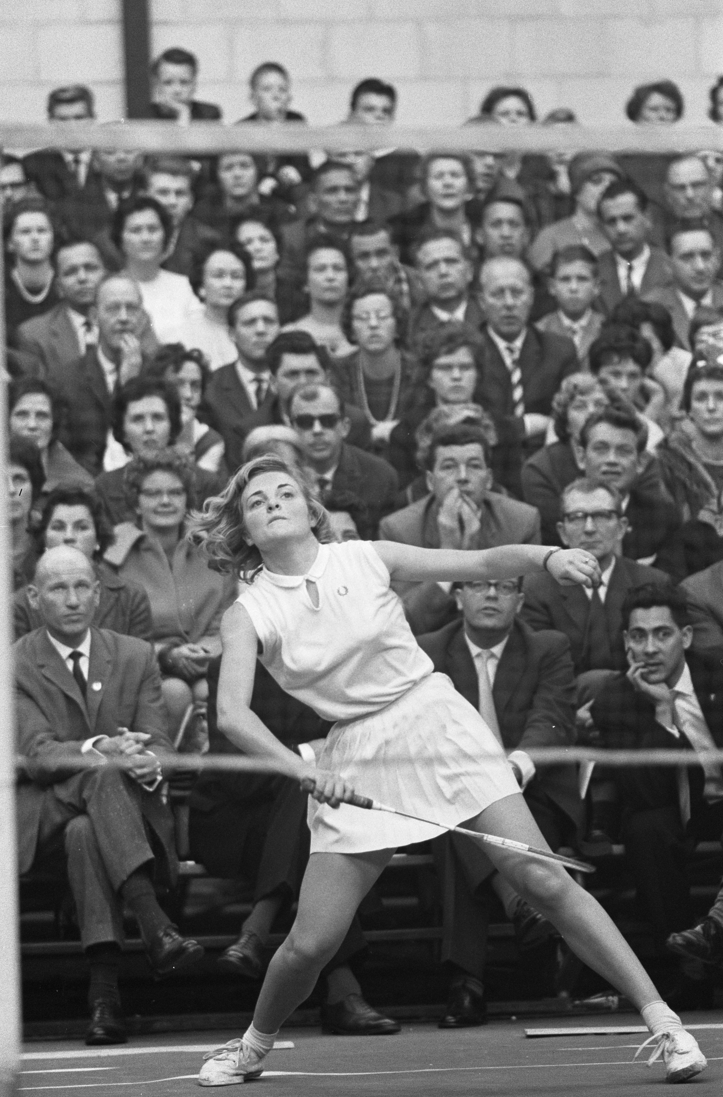 Collectie / Archief : Fotocollectie Anefo Reportage / Serie : [ onbekend ] Beschrijving : Internationale Badmintonkampioenschappen Haarlem in nieuw "Duinwijck" hal. Dahl Datum : 11 februari 1962 Locatie : Haarlem Trefwoorden : Badminton, kampioenschappen Persoonsnaam : DAHL Fotograaf : Pot, Harry / Anefo Auteursrechthebbende : Nationaal Archief Materiaalsoort : Negatief (zwart/wit) Nummer archiefinventaris : bekijk toegang 2.24.01.05 Bestanddeelnummer : 913-5112